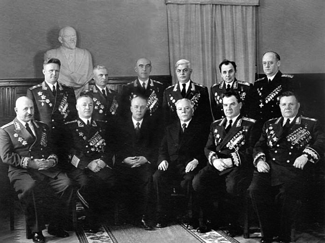 На церемонии вручения маршальских звёзд в Кремле. Слева направо: сидят И.Х. Баграмян, Н.Г. Кузнецов, Н.М. Пегов, К.Е. Ворошилов, В.И. Чуйков, А.И. Еременко; стоят: С.И. Руденко, В.И. Казаков, В.А. Судец, С.С. Варенцов, К.С. Москаленко, И.С. Исаков